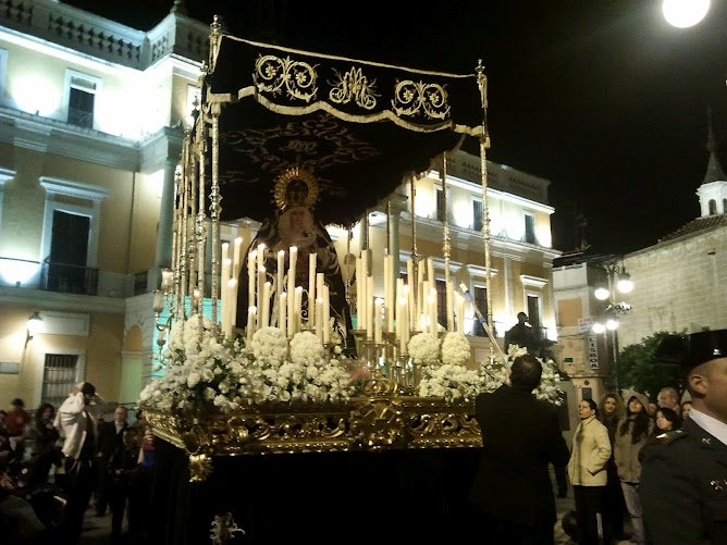 Paso de María Santísima del Mayor Dolor a su paso por la carrera oficial, Badajoz